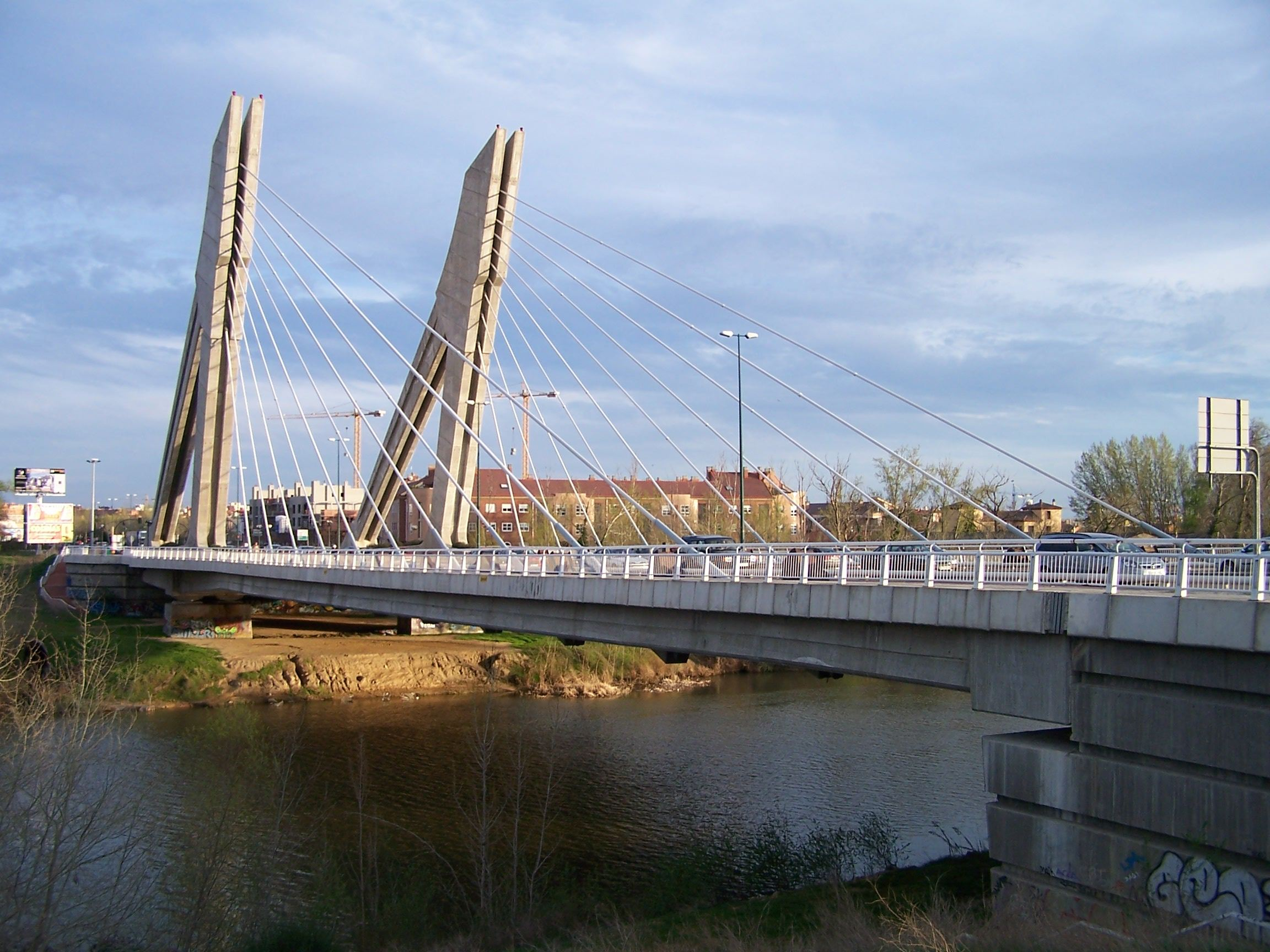 Es una foto que hice del puente de Hispanoamérica en Valladolid, es un puente atirantado un poco especial, porque los tirantes traseros están sustituidos por dos pilares de hormigón pretensado, formando un marco triángular con los pilones principales.